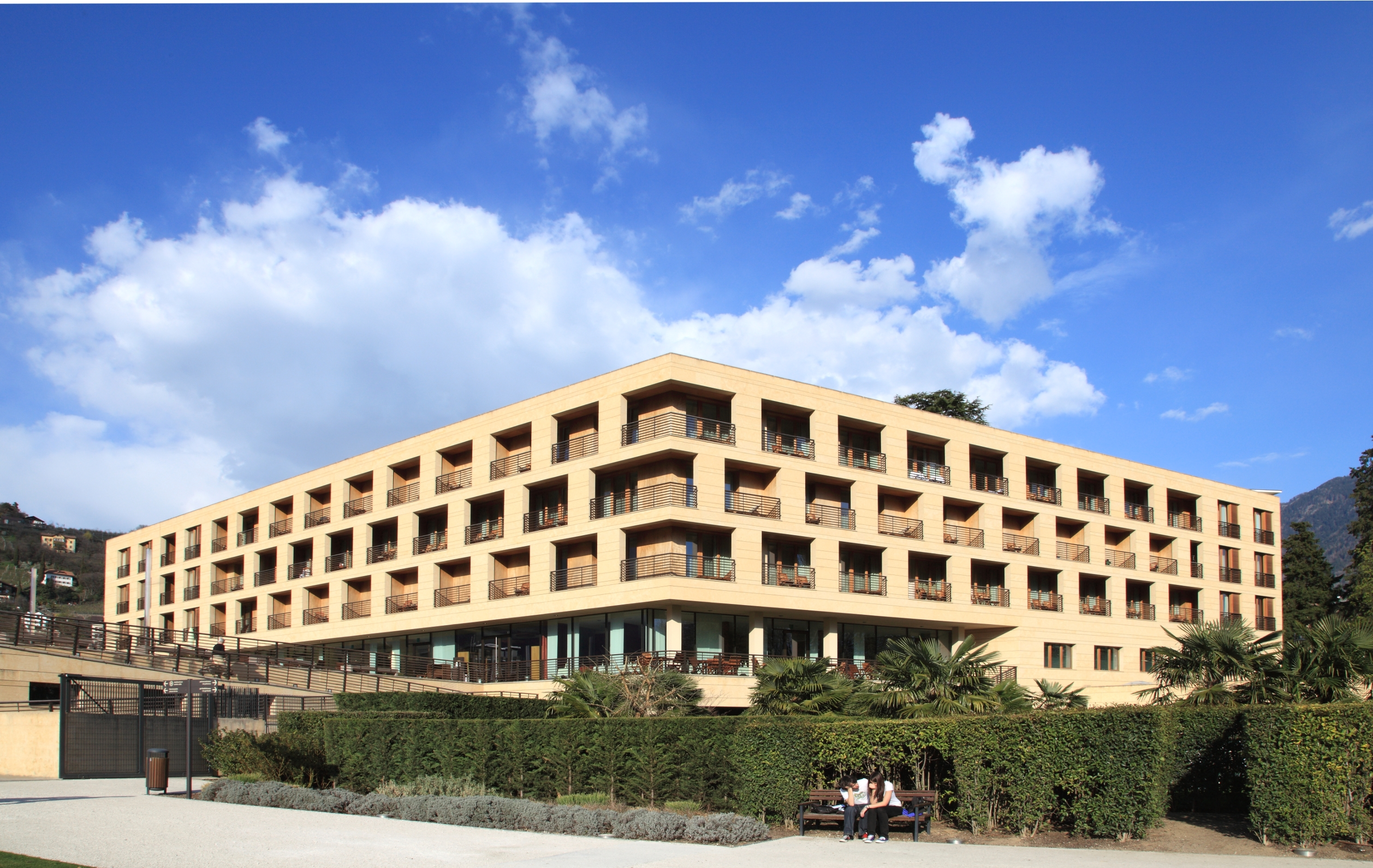 Hotel Therme Meran, Meran, Italien